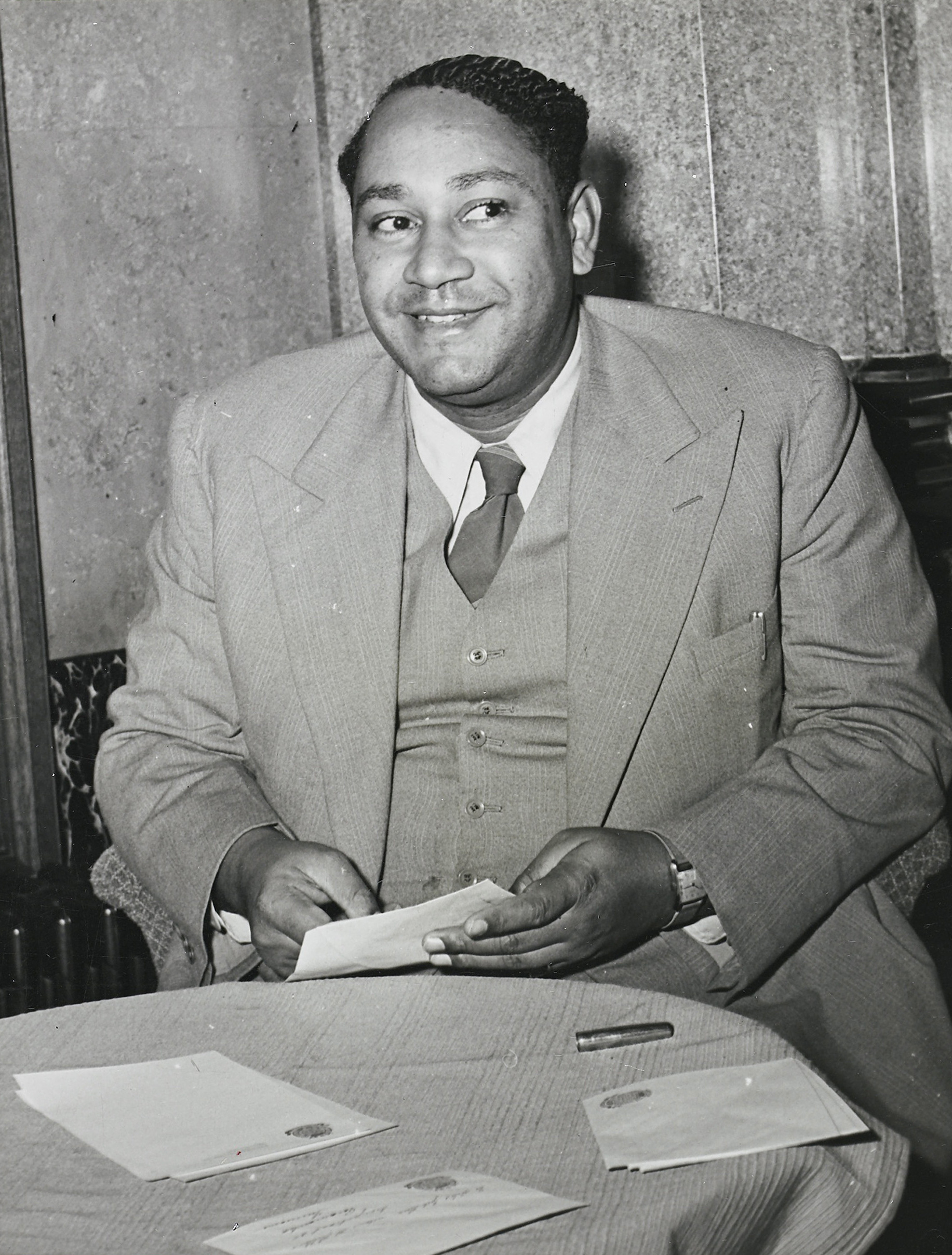 IdentificatieTitel(s): Een van de deelnemers aan de RTC: de heer J.A. de MirandaSurinamers in Nederland: 29 foto's uit het archief van Ons Vrije Nederland (serietitel)Objecttype: documentaire foto Objectnummer: NG-2005-19-18Omschrijving: Een van de deelnemers namens Suriname aan de Ronde Tafel Conferentie tussen Nederland en de West: notaris J.A. de Miranda, lid van de Staten van Suriname en gedelegeerde namens de Progressieve Surinaamse Volkspartij - opgericht in 1946. Hij zit aan een tafel Waar: op brieven liggen.VervaardigingVervaardiger: fotograaf: ParticamPlaats vervaardiging: Den HaagDatering: feb-1948Materiaal: fotopapier Techniek: fotografieAfmetingen: h 20 cm. × b 15 cm. OnderwerpWat: Rondetafelconferentie (1948)Wanneer: 1948-02 - 1948-02WaarDen HaagNederlandSurinameWie: Progressieve Surinaamse VolkspartijJ.A. de MirandaVerwerving en rechtenVerwerving: aankoop 2005Copyright: Publiek domein